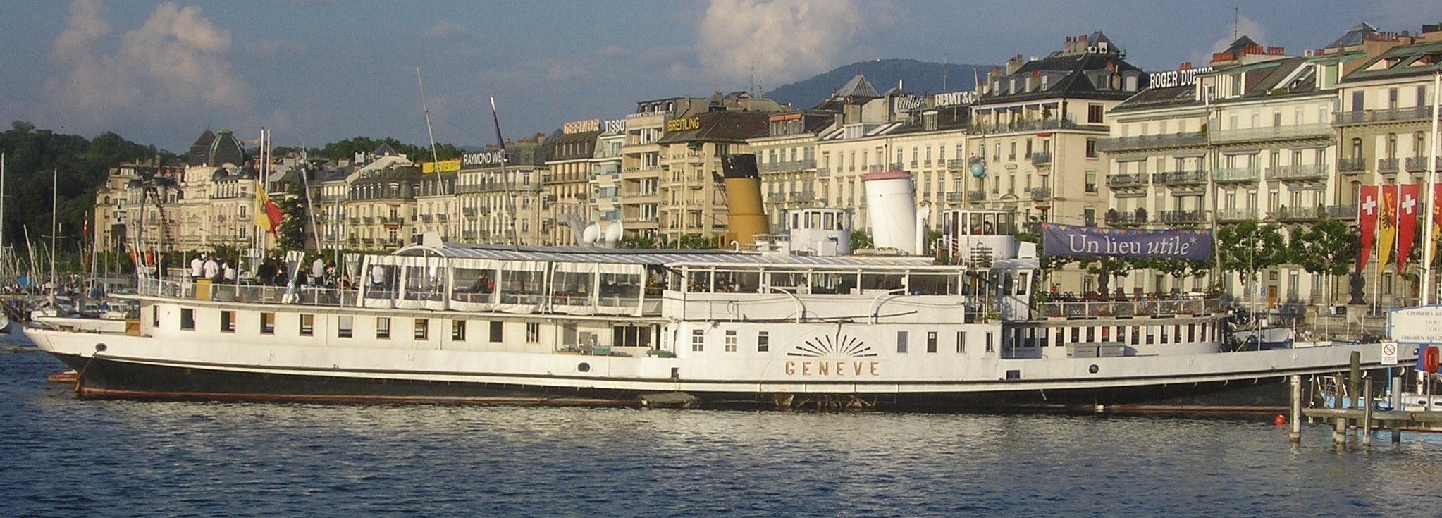 Le bateau Genève. Derrière le Genève se trouve le Vevey, avec sa cheminée jaune bien visible.